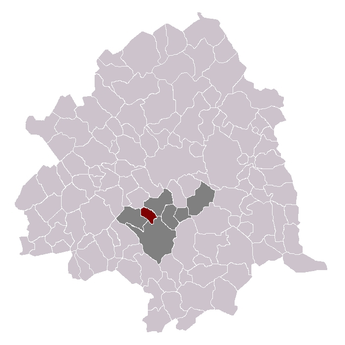 Noyelles-lès-Seclin dans son canton et son arrondissement